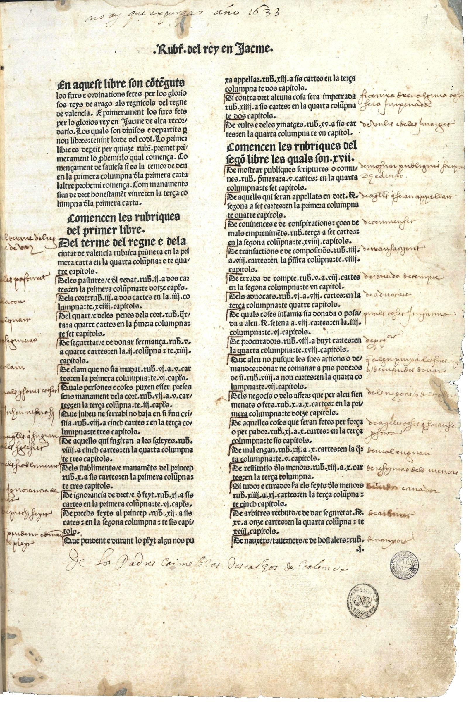 Primera plana de l'obra "En aquest libre són contenguts los furs e ordinations fetes per los gloriosos reys de Aragó als regnícols del regne de València". València : Lambert Palmart, 1482.